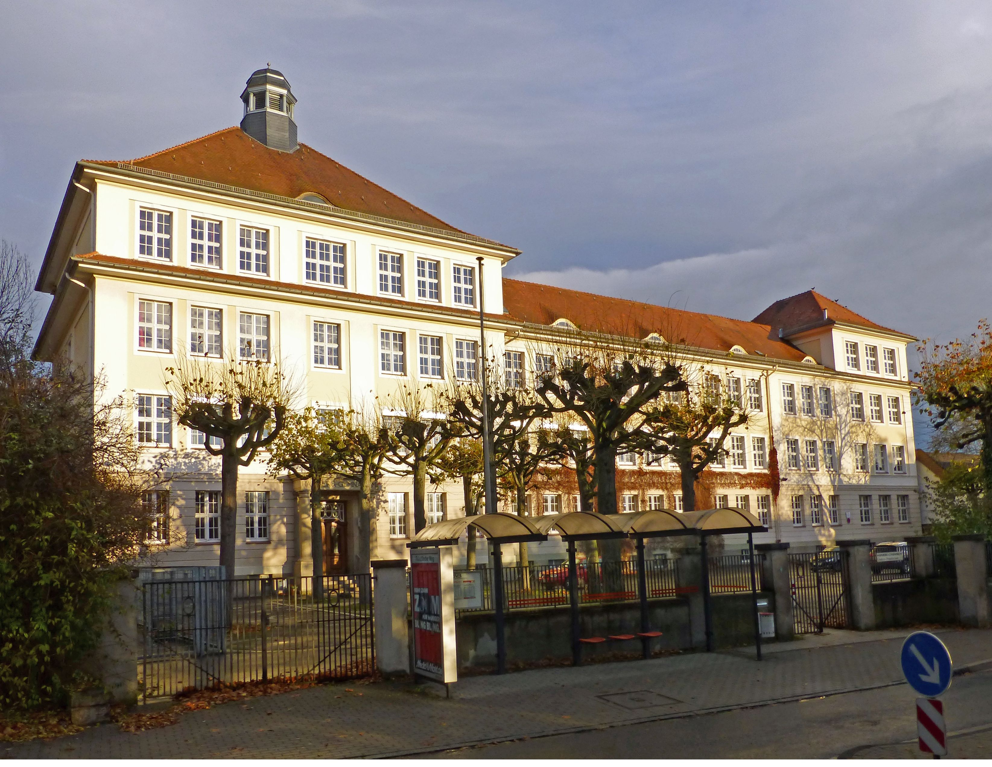 Straßenfront des Hainberggymnasiums in Göttingen, Südniedersachsen. Erbaut 1911-13 nach Plänen des Stadtbaurates Otto Frey